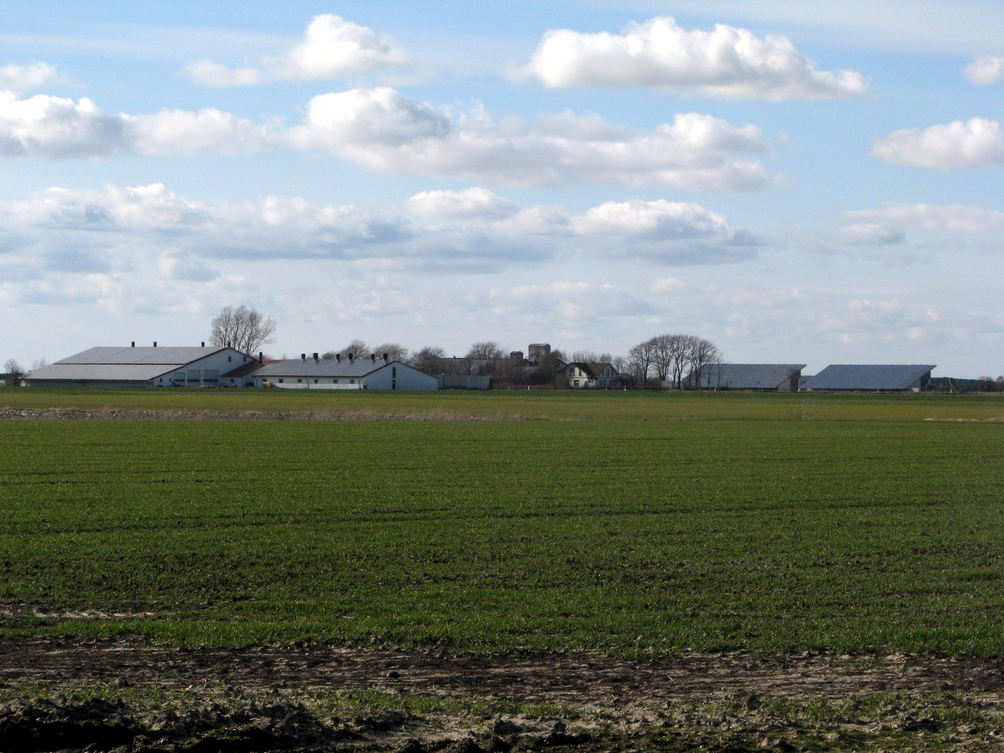 Wirtschaftsgebäude mehrerer Bauernhöfe im Cecilienkoog (Gemeinde Reußenköge)